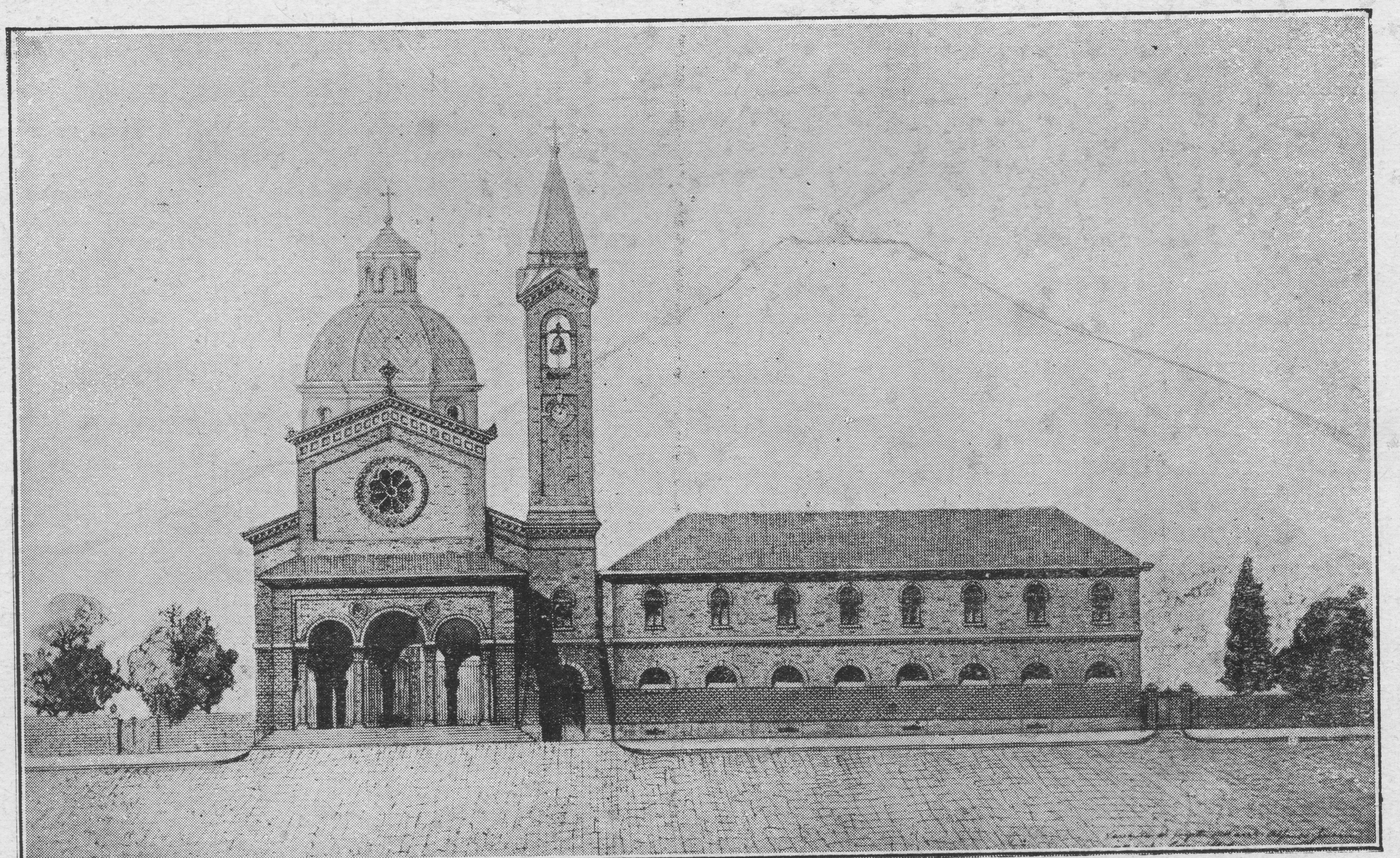 Progetto Guerra